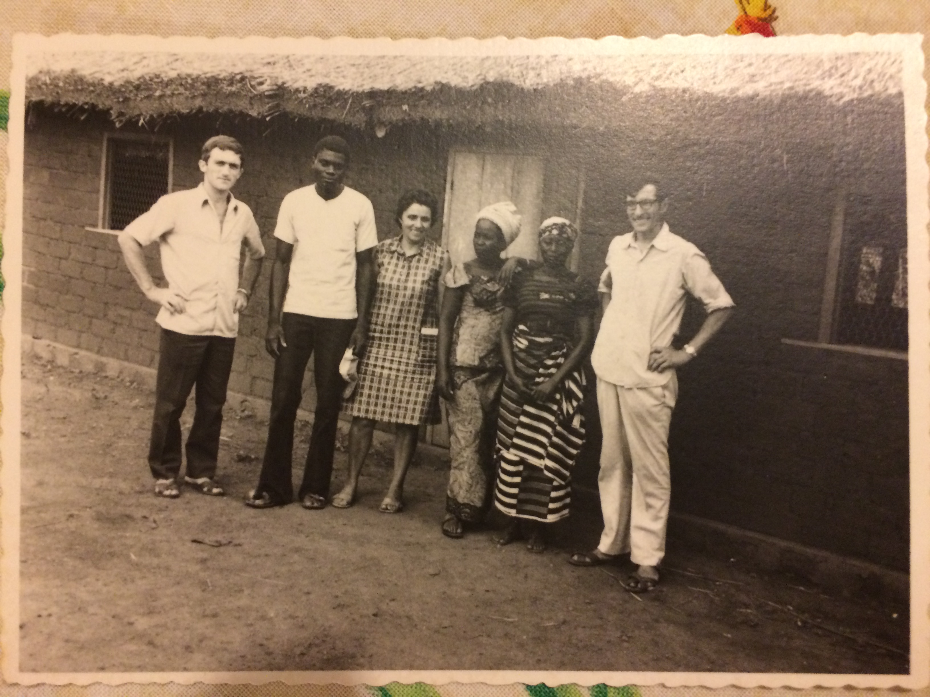 Mission catholique en RCA - 1972